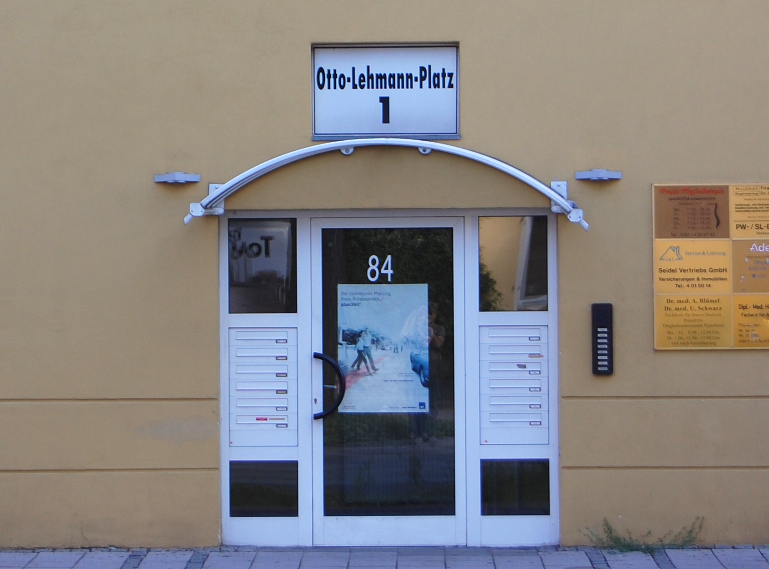 Gebäude in der Straße Alt Fermersleben mit der Aufschrift Otto-Lehmann-Platz 1